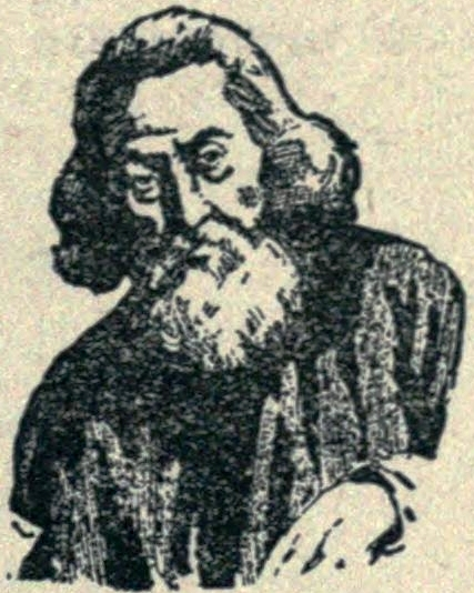 ייִדיש: יצחק-בער לעווינזאהן: ייִדיש: אמנטאָלאָגיע פינף הונדערט יאָהר אידישע פּאָעזיע